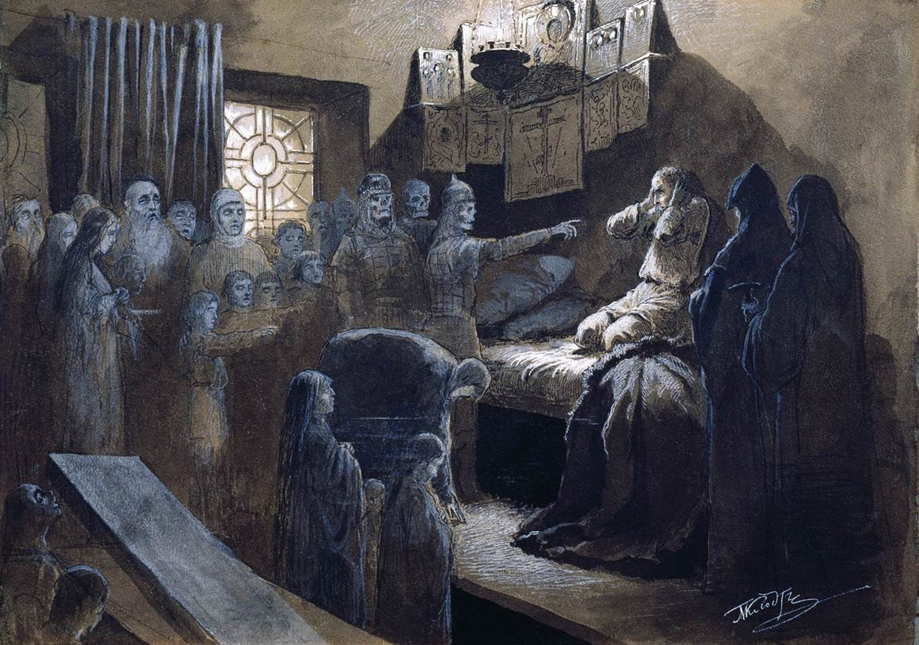 Михаил Клодт, "Иван Грозный и тени его жертв" (Ивану Грозному являются тени им убитых) State Art Museum, Stavropol Материалы: бумага, тушь, гуашь Размеры: 27 х 39 см Ставропольский краевой музей изобразительного искусства